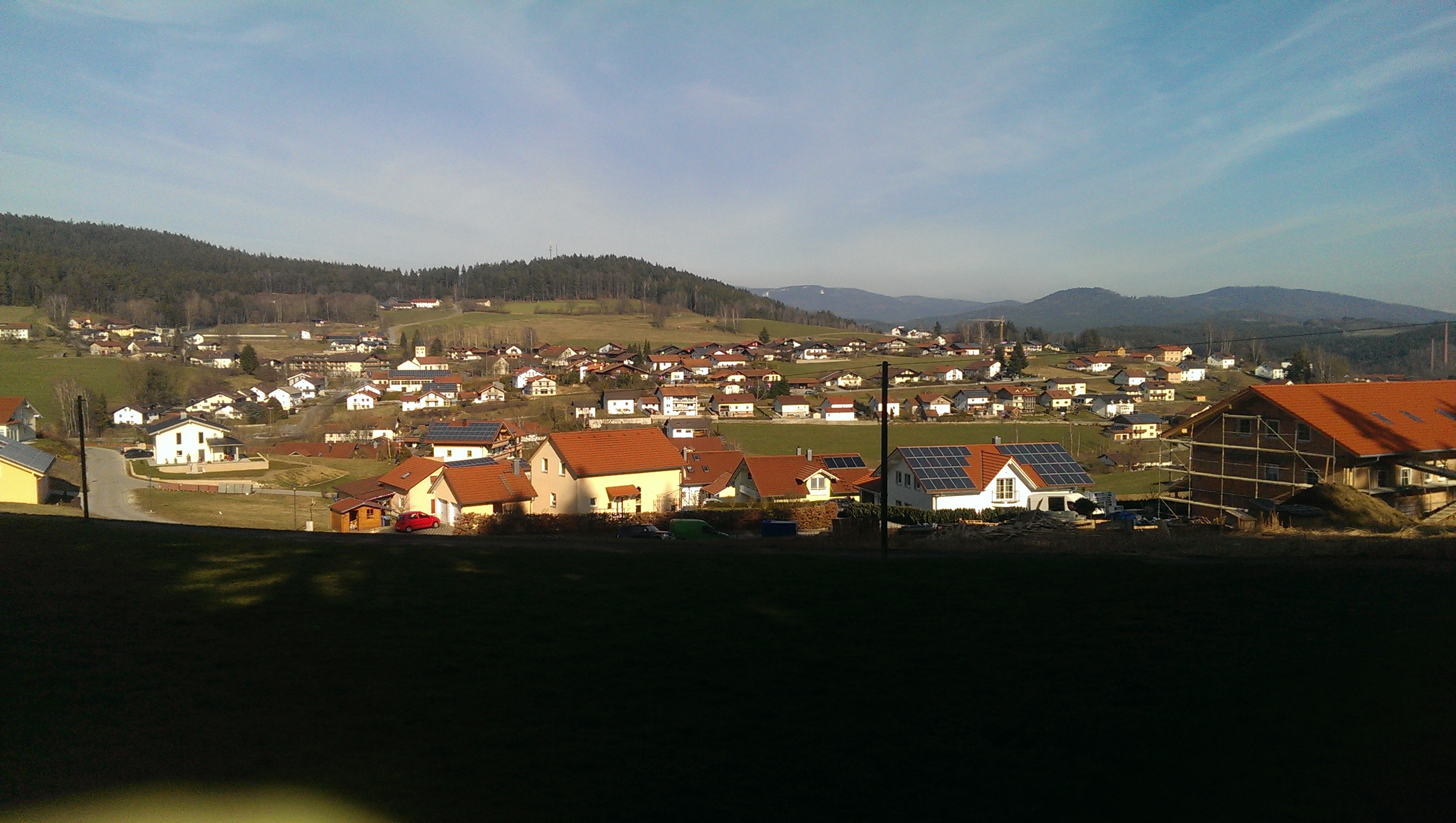 Geiersthal von Westen gesehen. Im Hintergrund: Der Hochzellberg in der Arber-Bergkette und am Fuße Bodenmais.